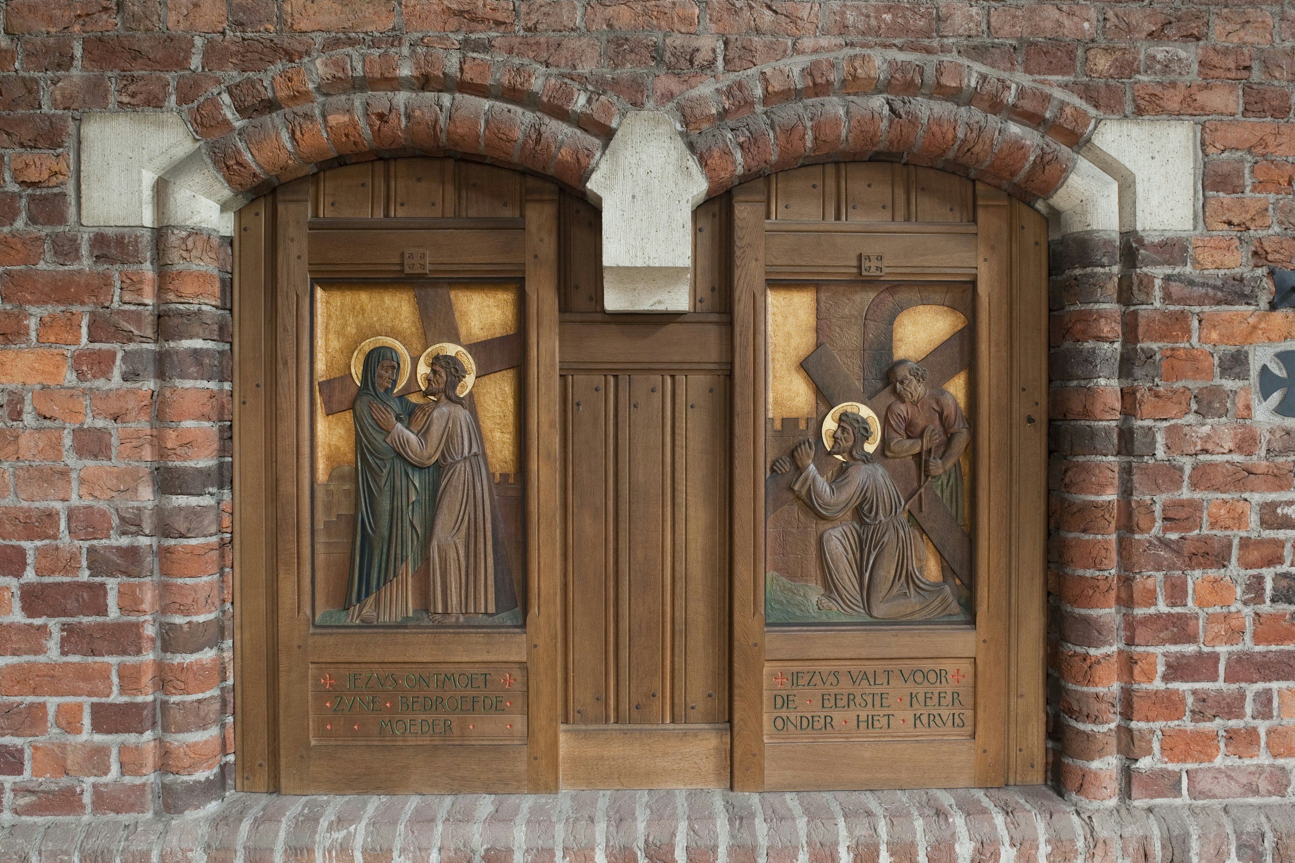 O.L. Vrouw ten Hemelopneming: Interieur, kruiswegstatie: Jezus ontmoet zijn bedroefde moeder Jezus valt voor de eerste keer onder het kruis